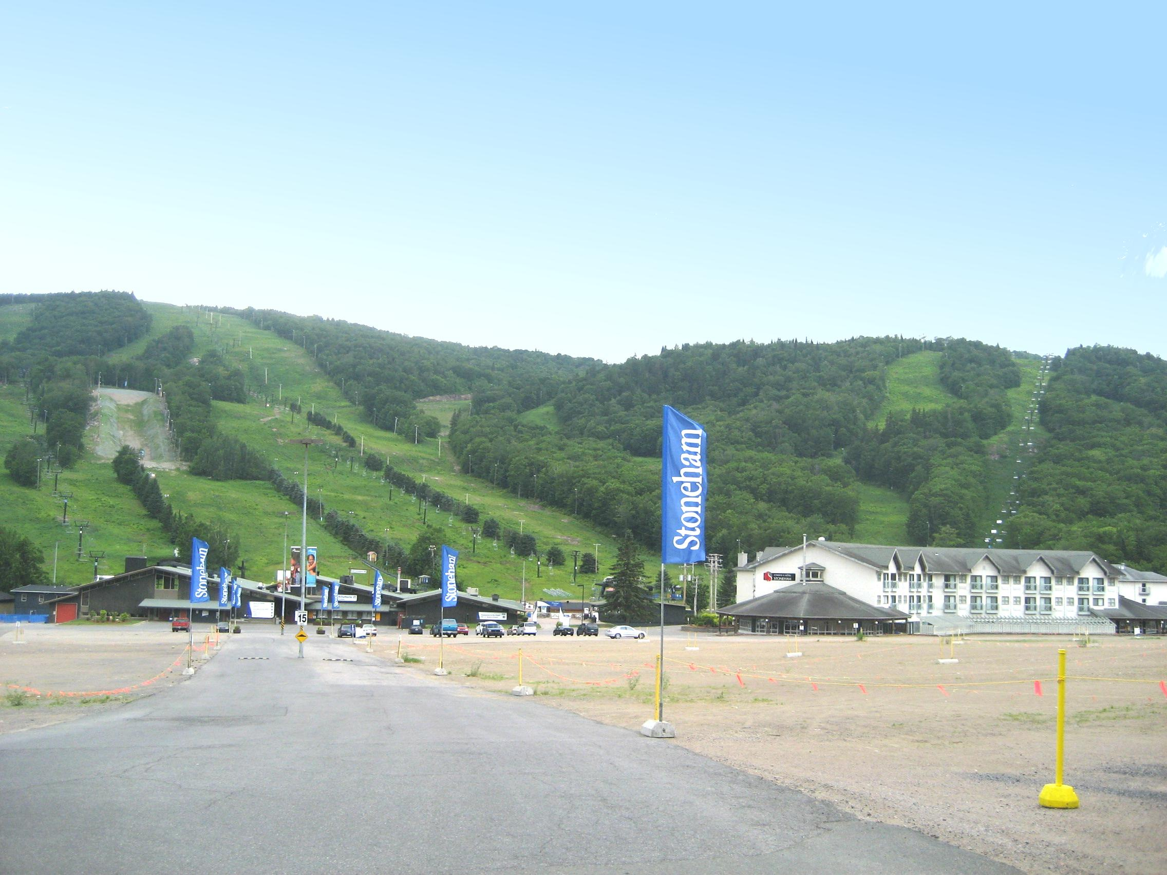 Station touristique de Stoneham (Stoneham-et-Tewkesbury)